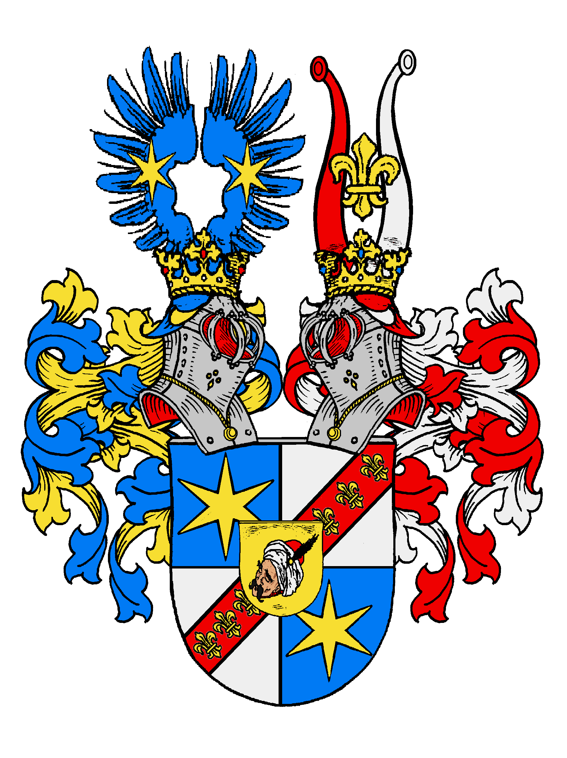 Freiherrliches Wappen der von Gillern, einem ursprünglich aus Vorderösterreich stammenden, böhmisch-schlesischen, seit 1742 auch preußisch-schlesischem Adelsgeschlecht.